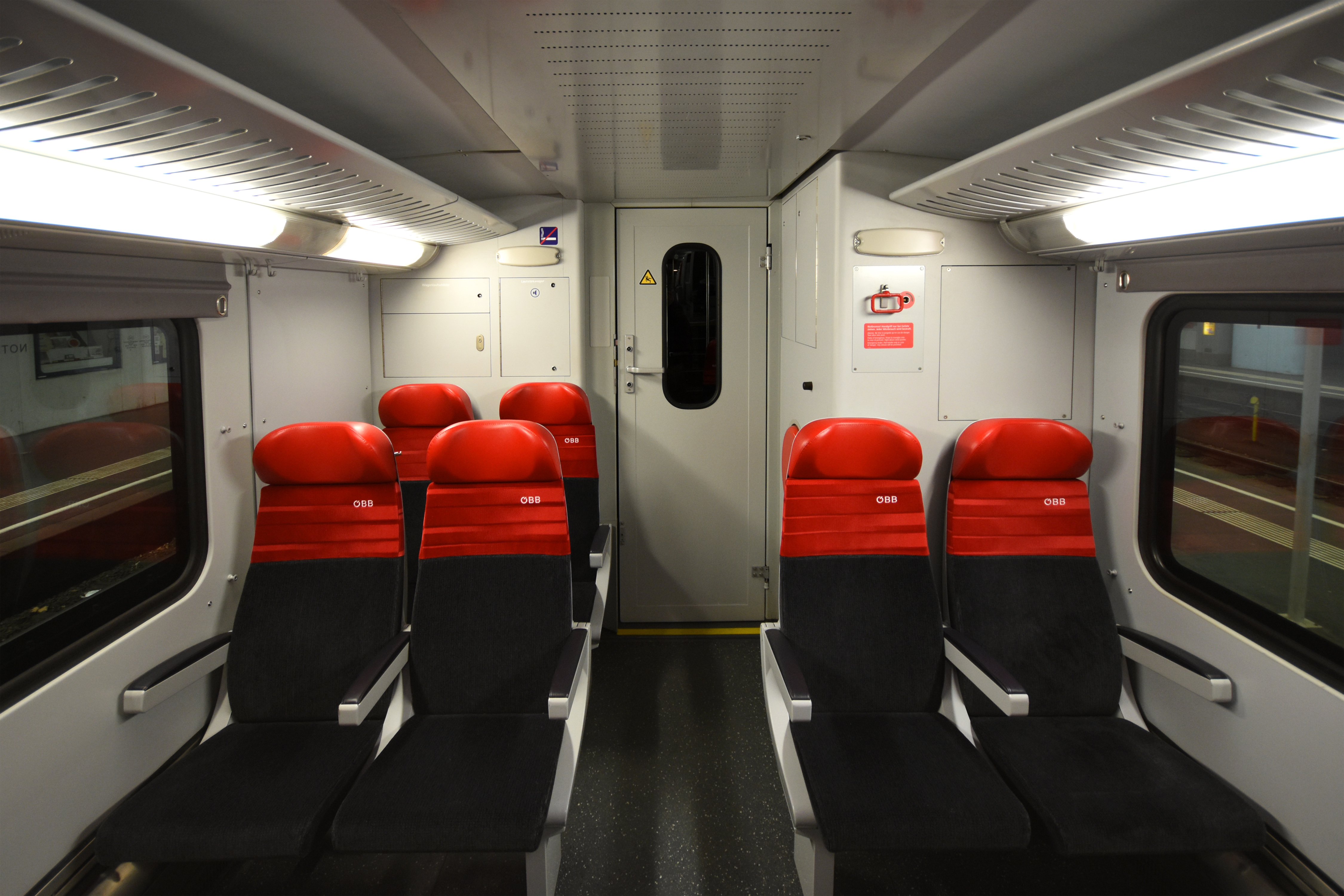 Sitzgruppen am Wagenende in einem modernisierten DoSto-Zwischenwagen